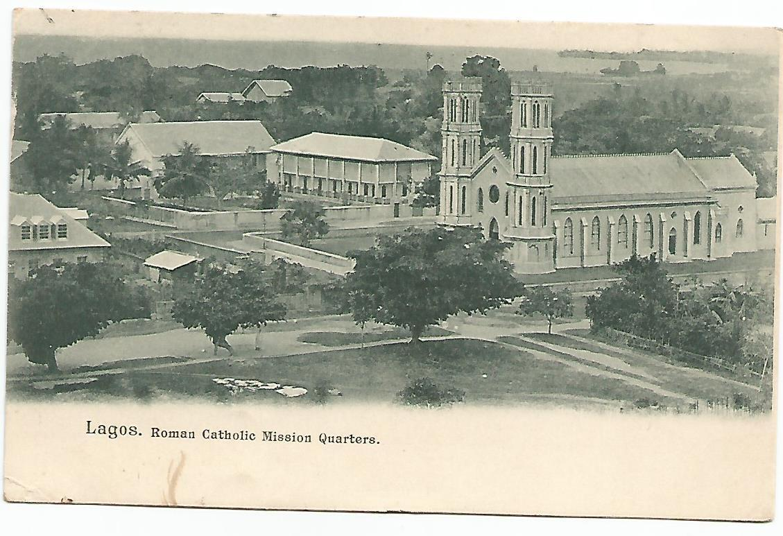 Mission catholique de Lagos vers 1925.